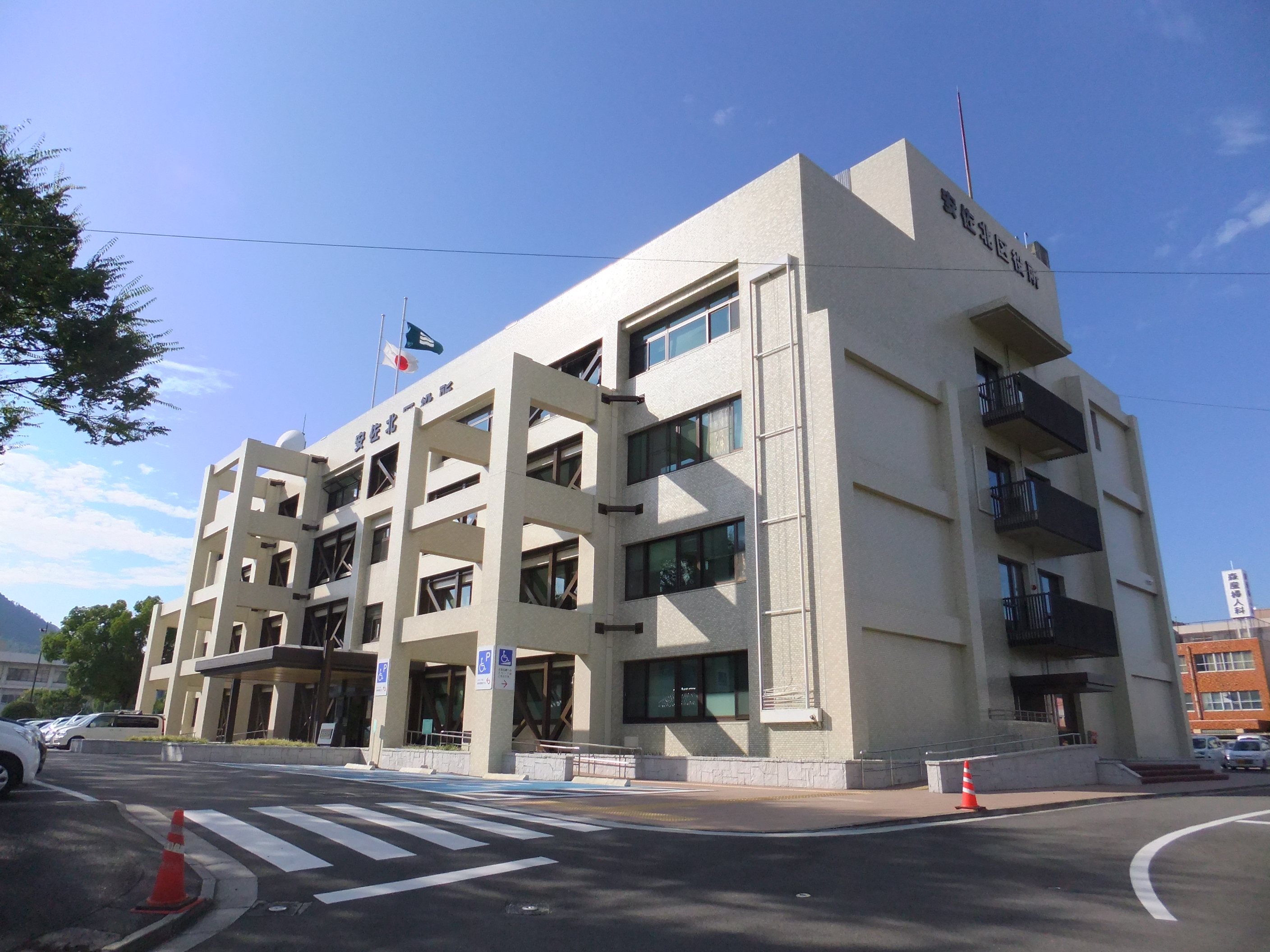 安佐北区役所